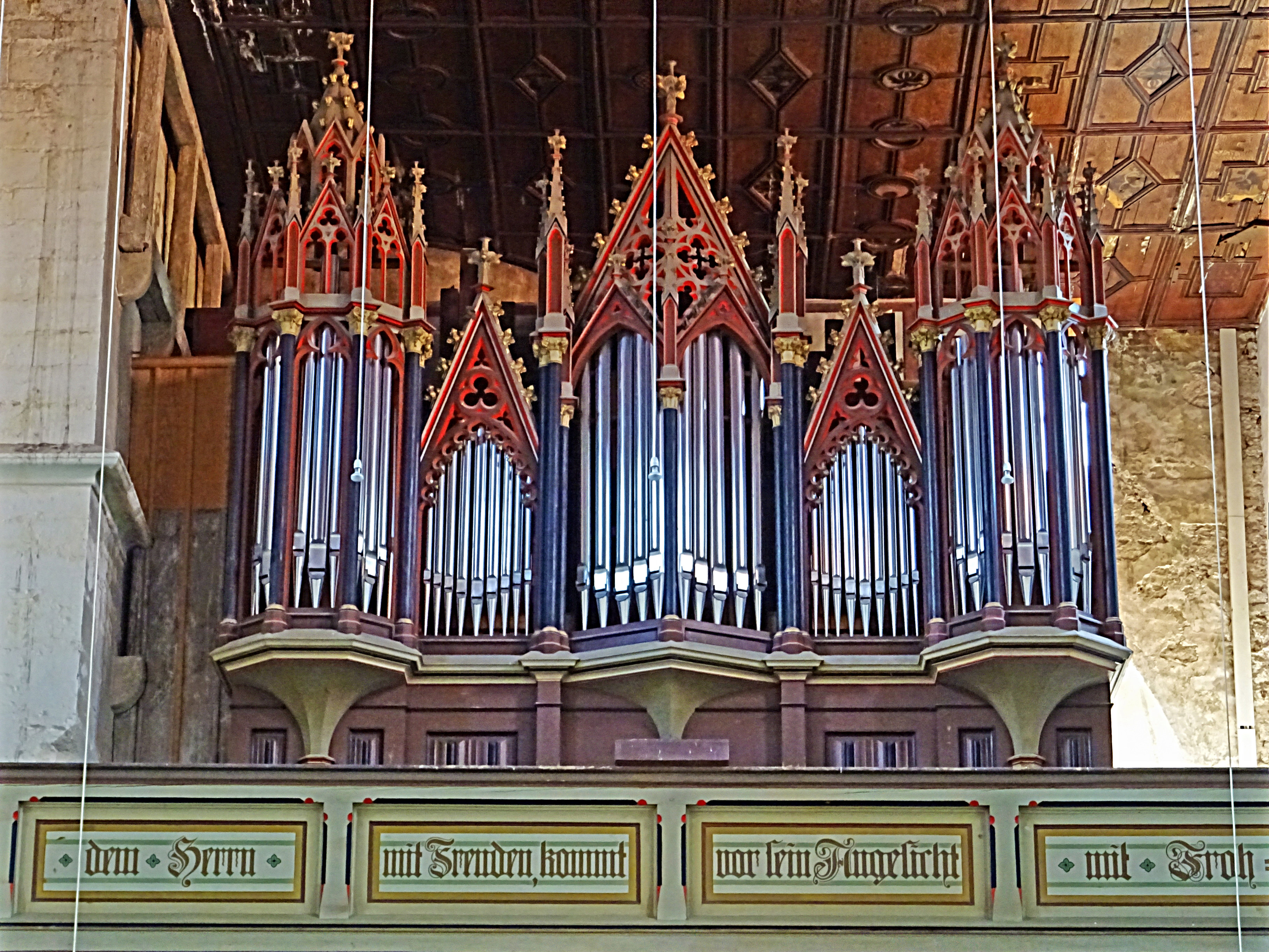 Orgel von Friedrich Erdmann Petersilie (1884, Opus 52, III/P37) in der Bergkirche St. Stephani (Langensalza)